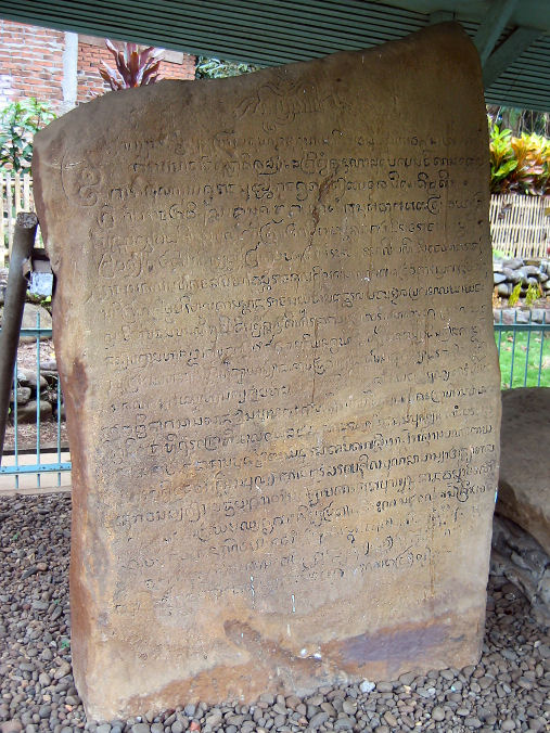 Batu tulis from Adityawarman's kingdom in Pagarruyung